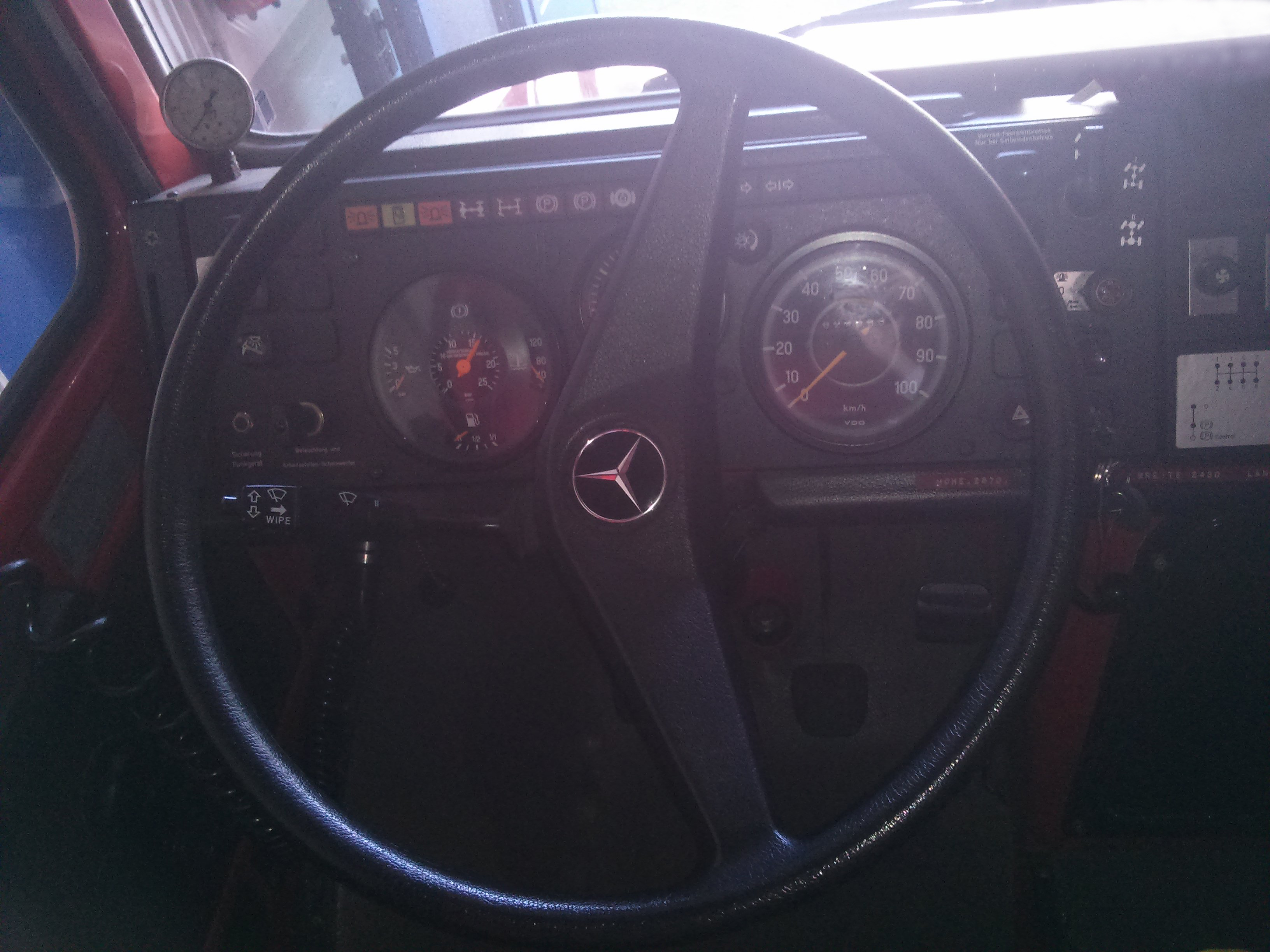 Interieur eines Unimog 435, bedauerlicherweise nicht so ein schönes Foto.